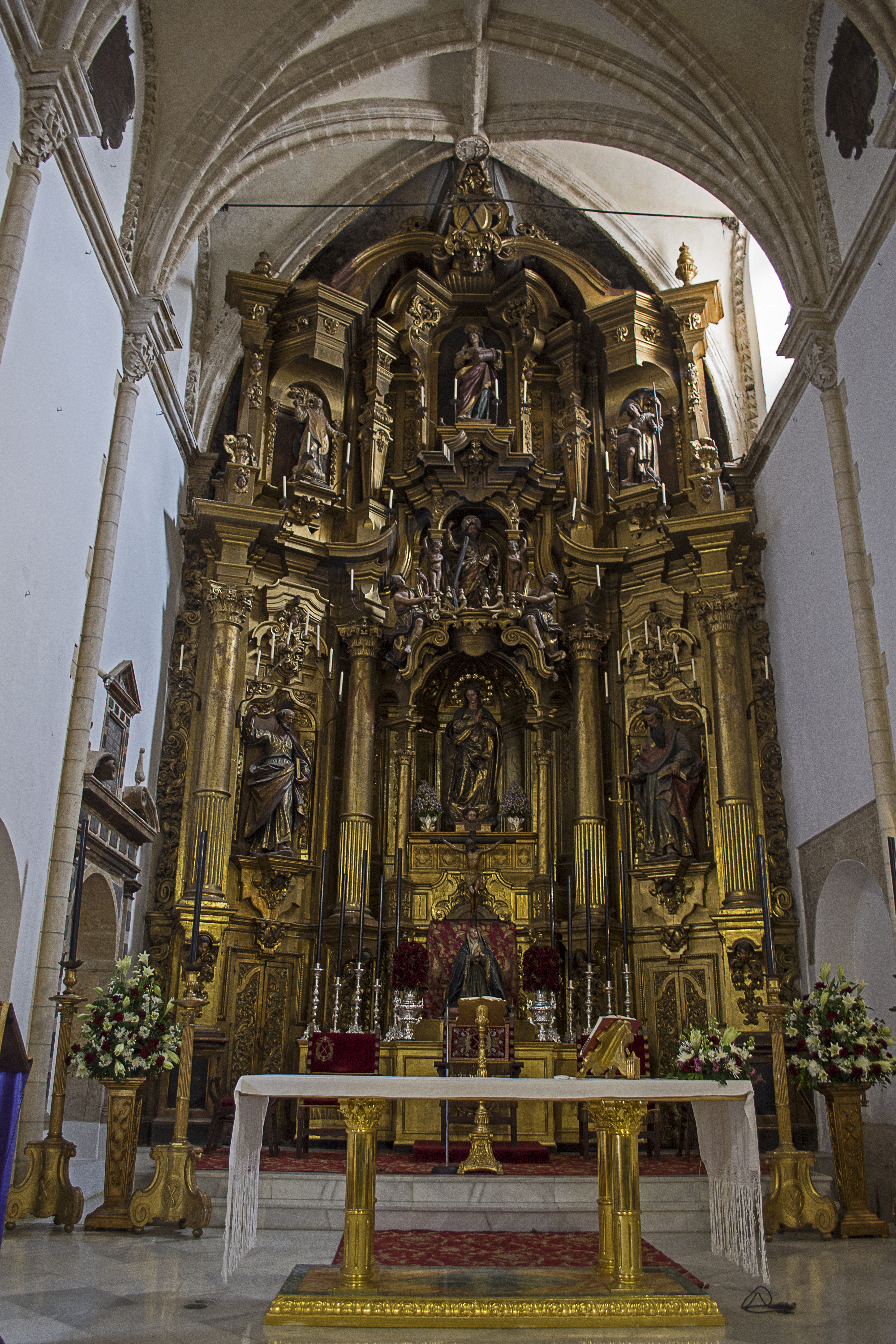 Retablo mayor de la iglesia de San Andres Sevilla